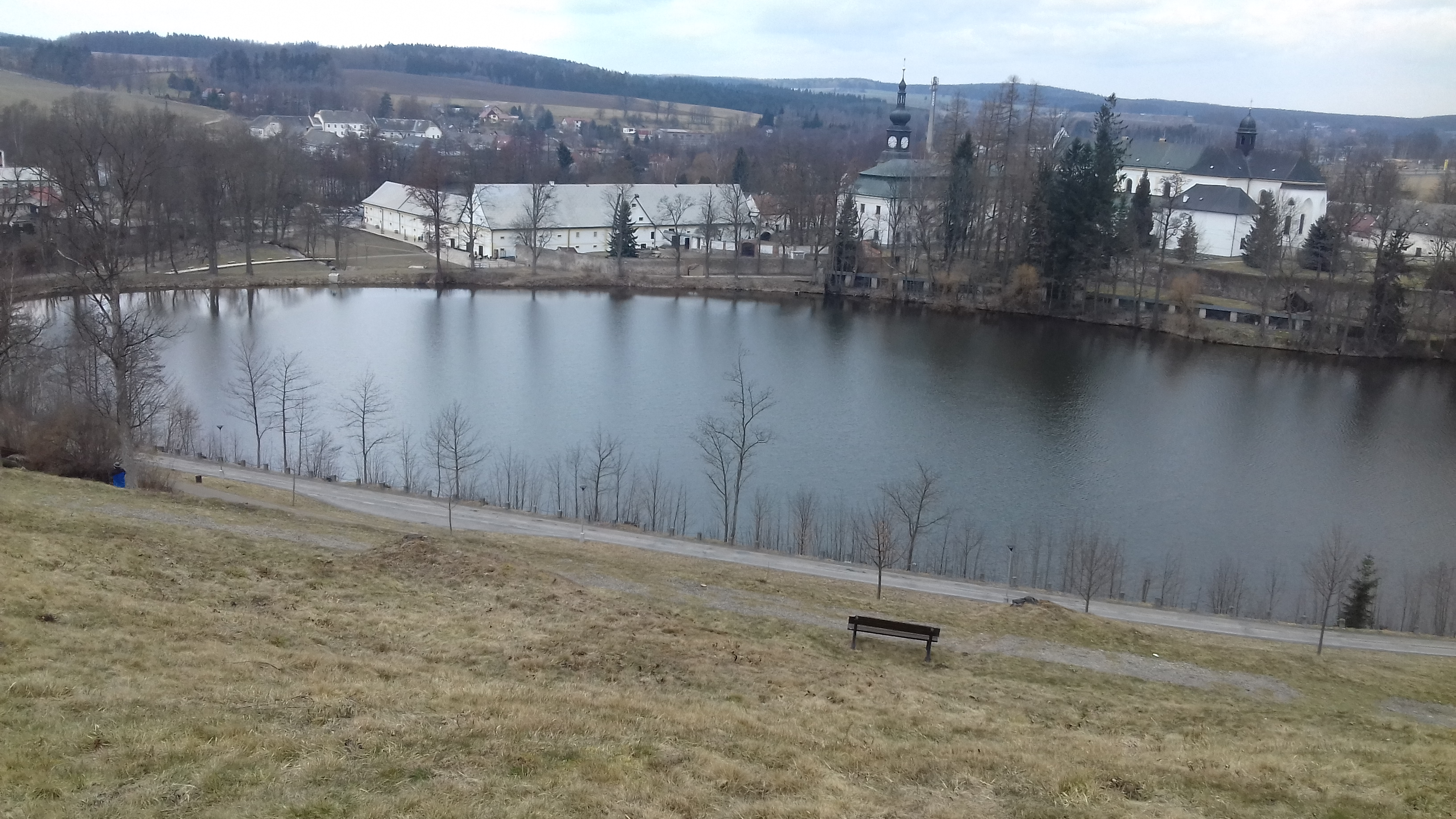 naučná stezka, pohled ze Zelené hory